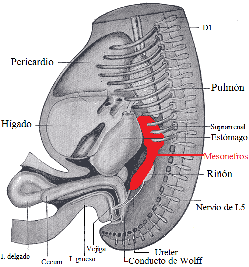 Imagen de embrión humano en la que es visible el mesonefros.